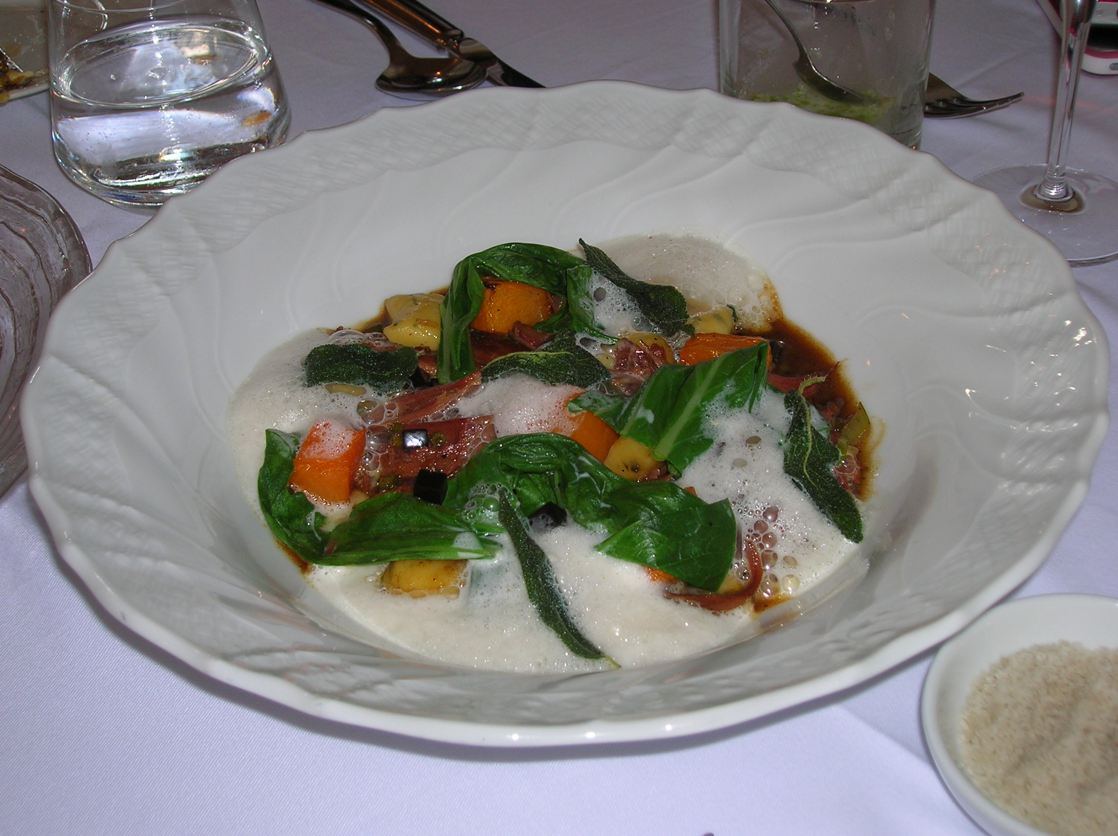 Catit 3